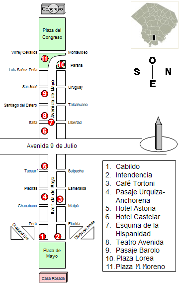 Mapa de Avenida de Mayo. Buenos Aires.